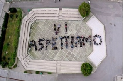 Cavea del Liceo ginnasio Scaduto